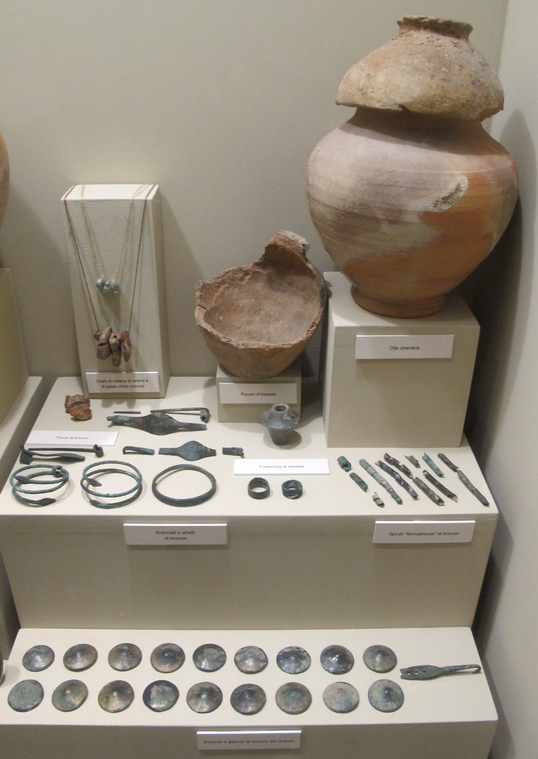 Museo nazionale di Villa Guinigi - MIBAC This is a photo of a monument which is part of cultural heritage of Italy.